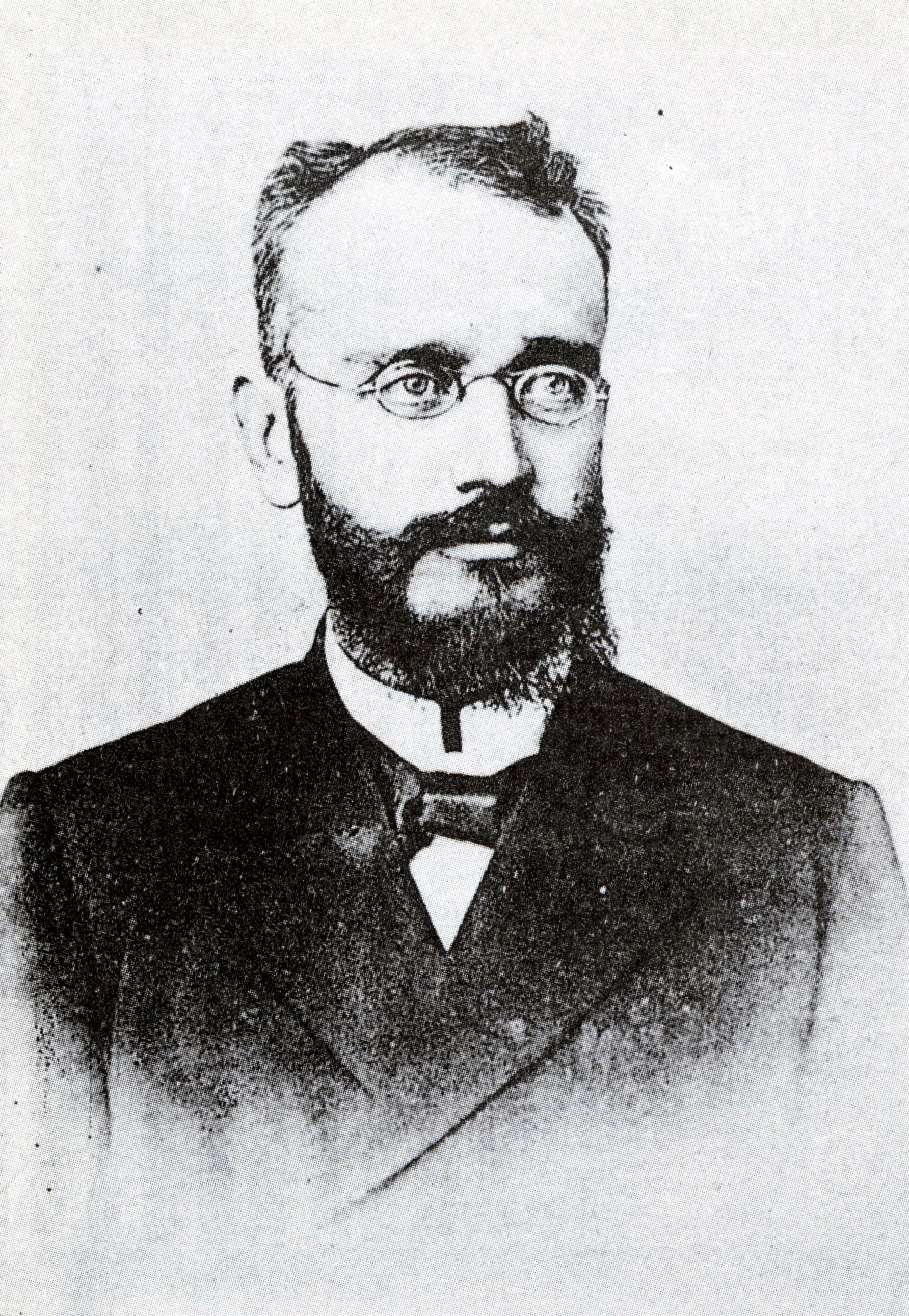 Eleftherios Venizelos, 1903 Oppositionsführer auf Kreta